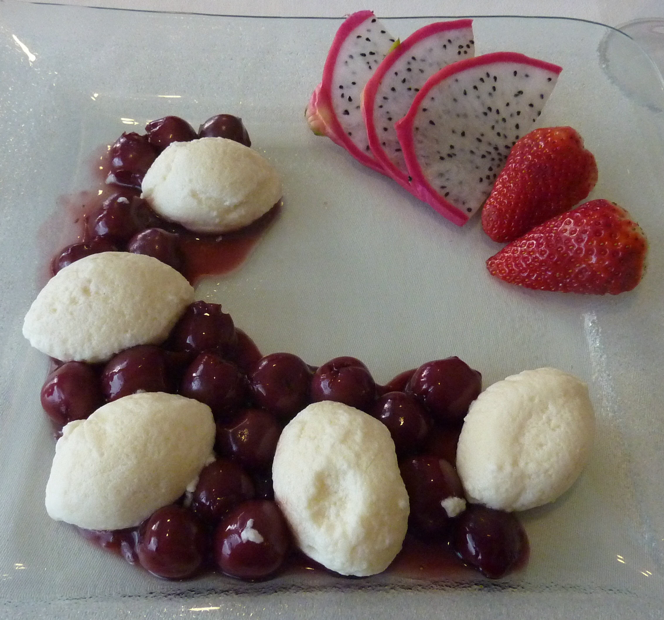 Grießnocken mit Kirschen